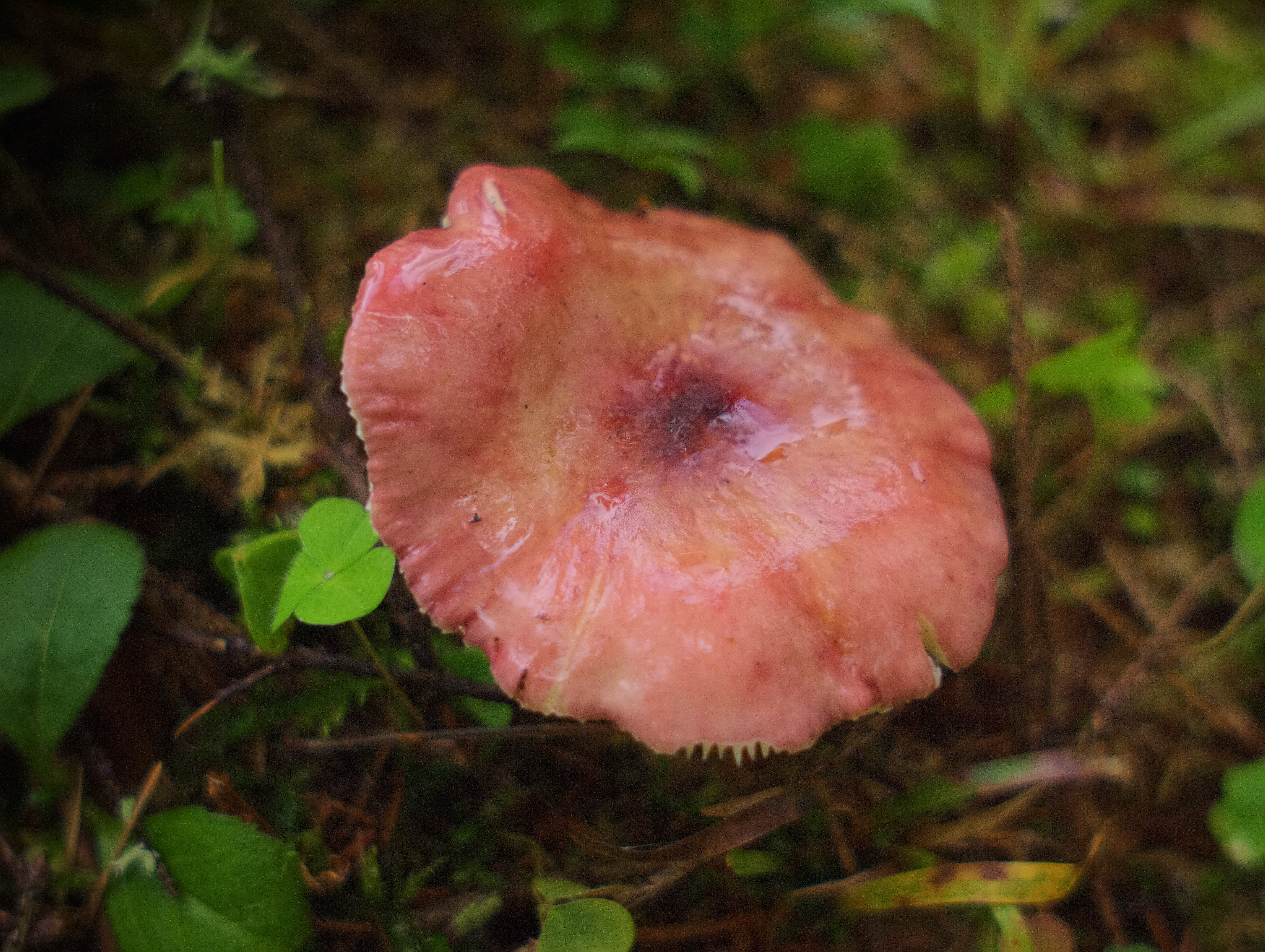 Nuori haaparousku, ainakin oletettavasti. Kasvupaikkana kangasmetsä suon reunalla. Jalka ontto.